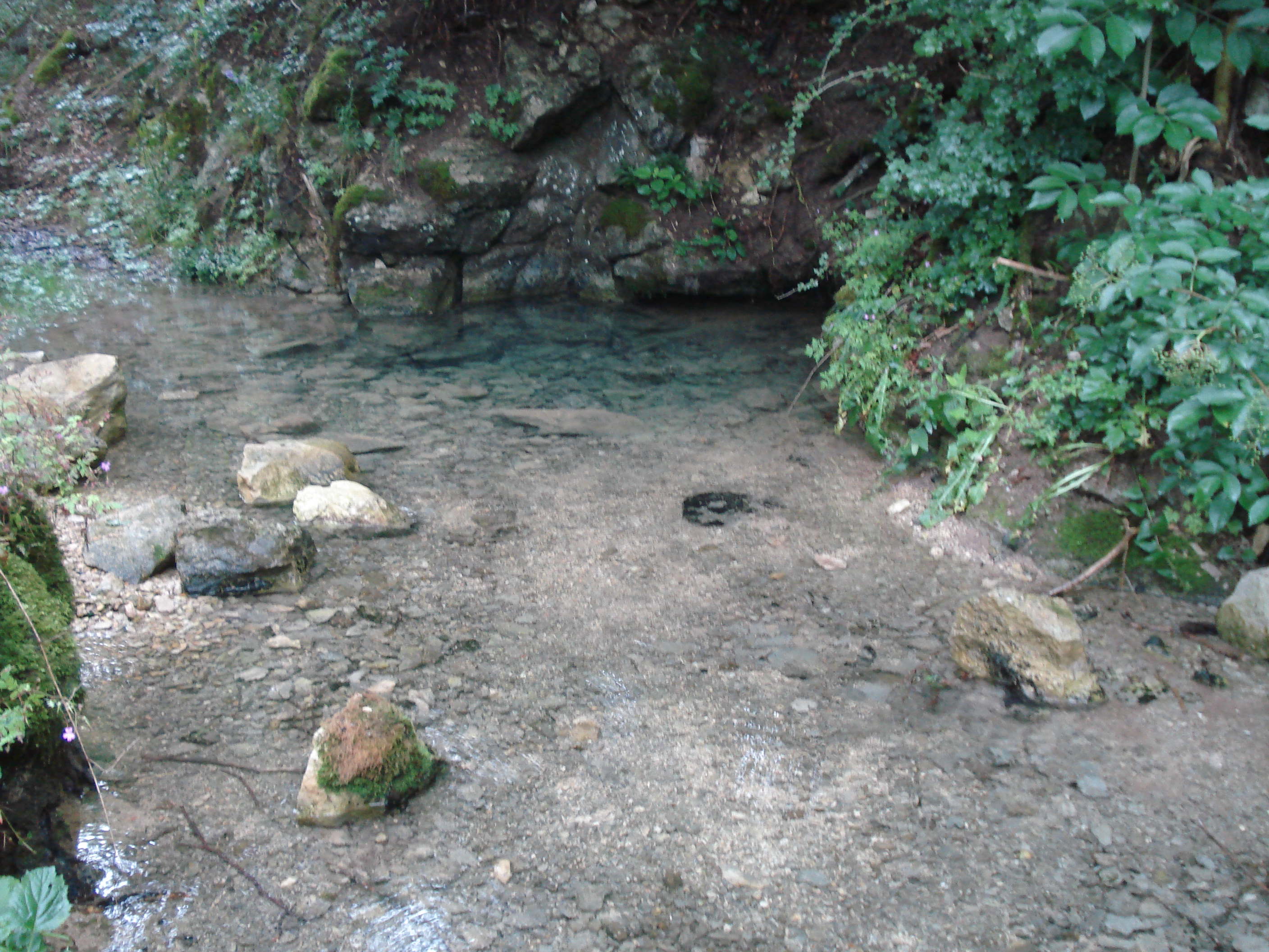 Eine der Karstquellen (neben der Wulfbachquellhöhle) aus der der Wulfbach entspringt